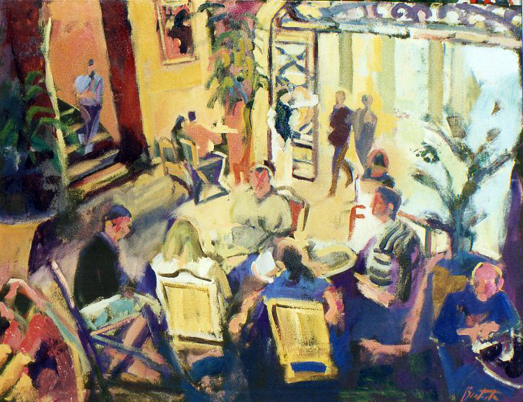 "Café la Habana" oleo /lienzo 89 x 116 cm.